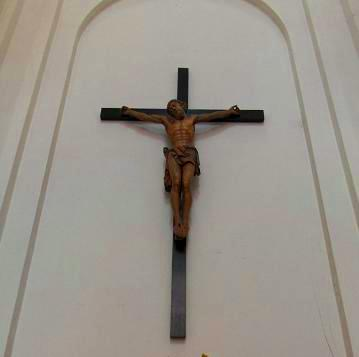 Zabytkowy krucyfiks z kościoła Matki Boskiej Łaskawej